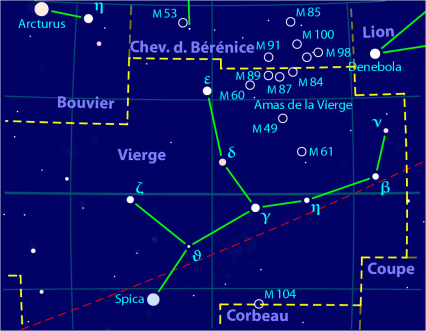 Carte pour la constellation Vierge Produite à l'aide du logiciel PP3